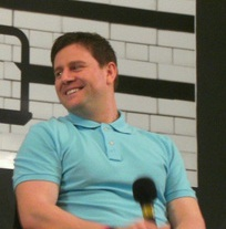 Kai Owen